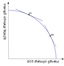 සිංහල: ආන්තික අනුරූපිතා අනුපාතය